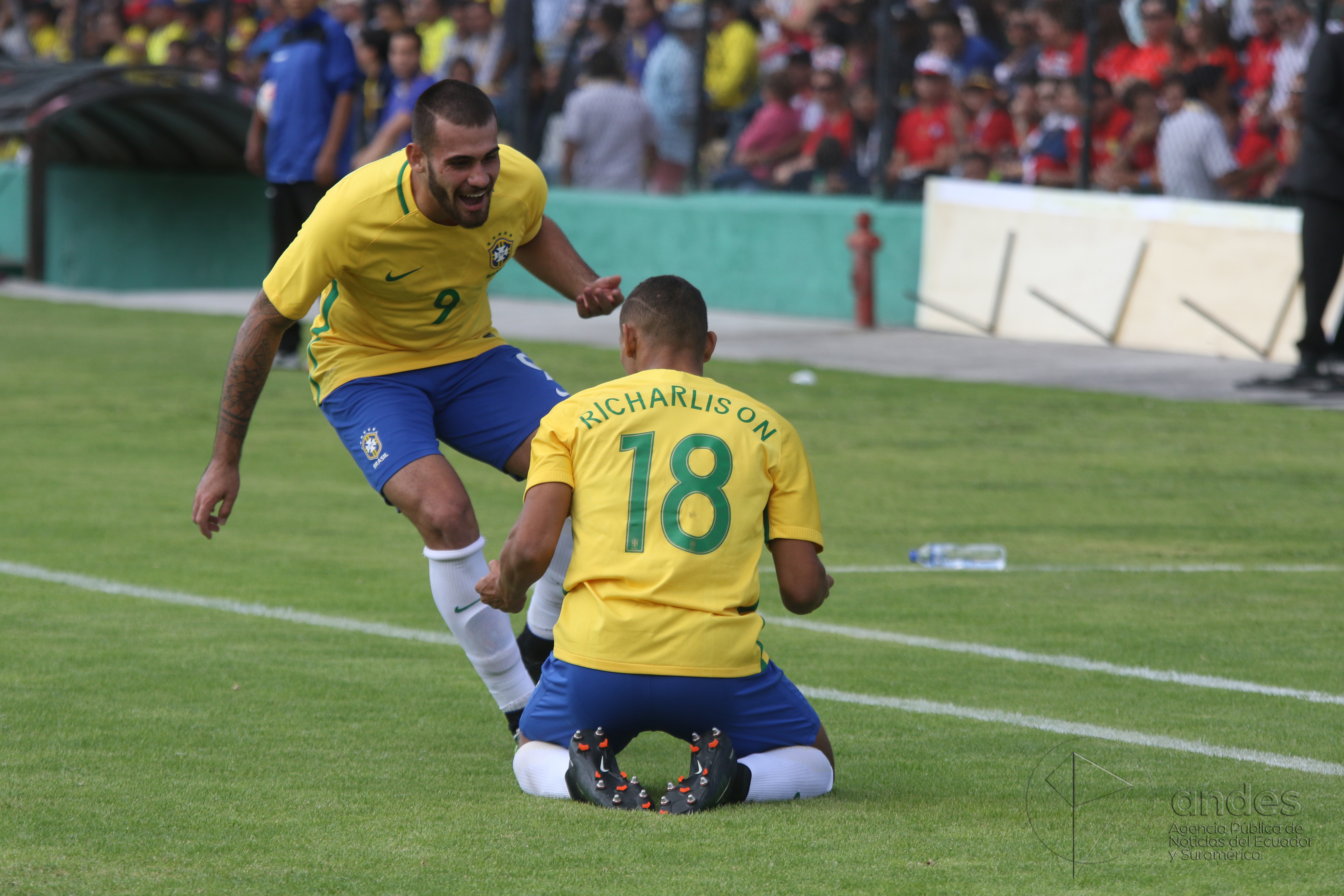 BRASIL PARAGUAY SUB 20 2 MAV